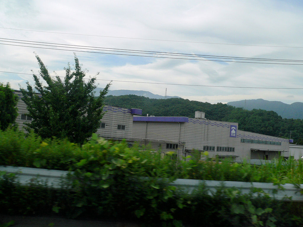 テンヨ武田工場（車で道路走行中、後部座席より撮影）